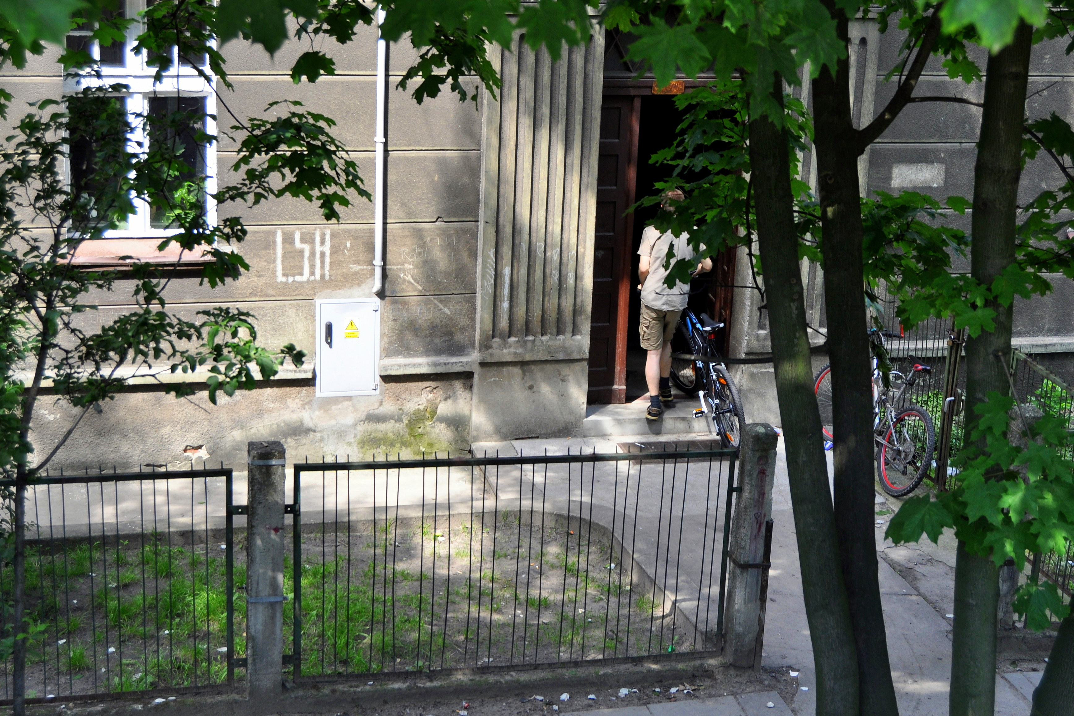 Ostrów Wlkp., ul. Parkowa. Oznakowanie z lat II wojny światowej, budynku mieszkalnego posiadającego cywilną piwnicę przeciwlotniczą (Luftschutz Keller)